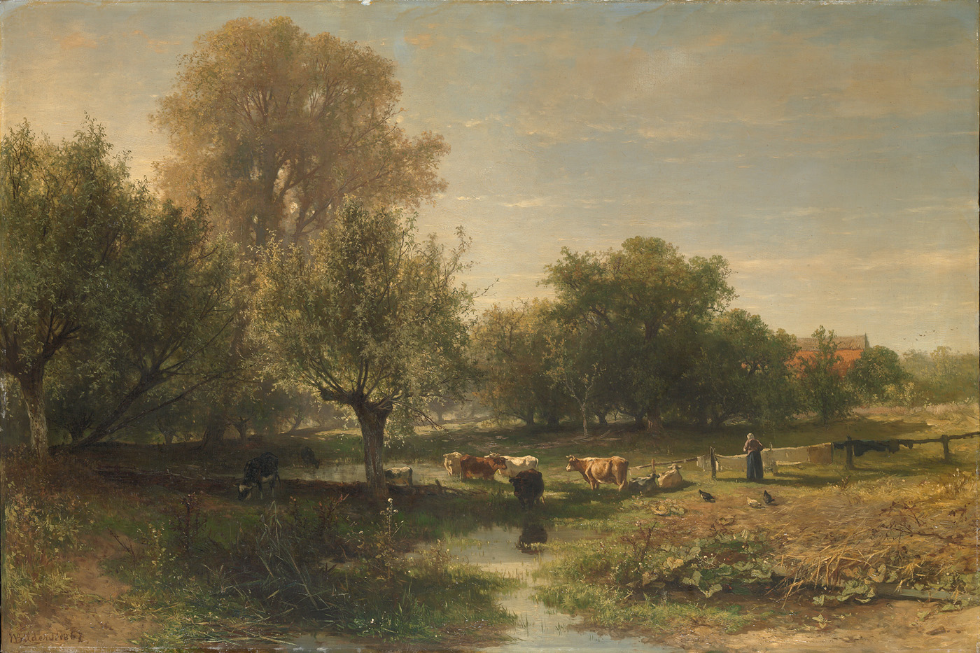 schilderij; landschap; Oosterbeek; Gelderland; koe